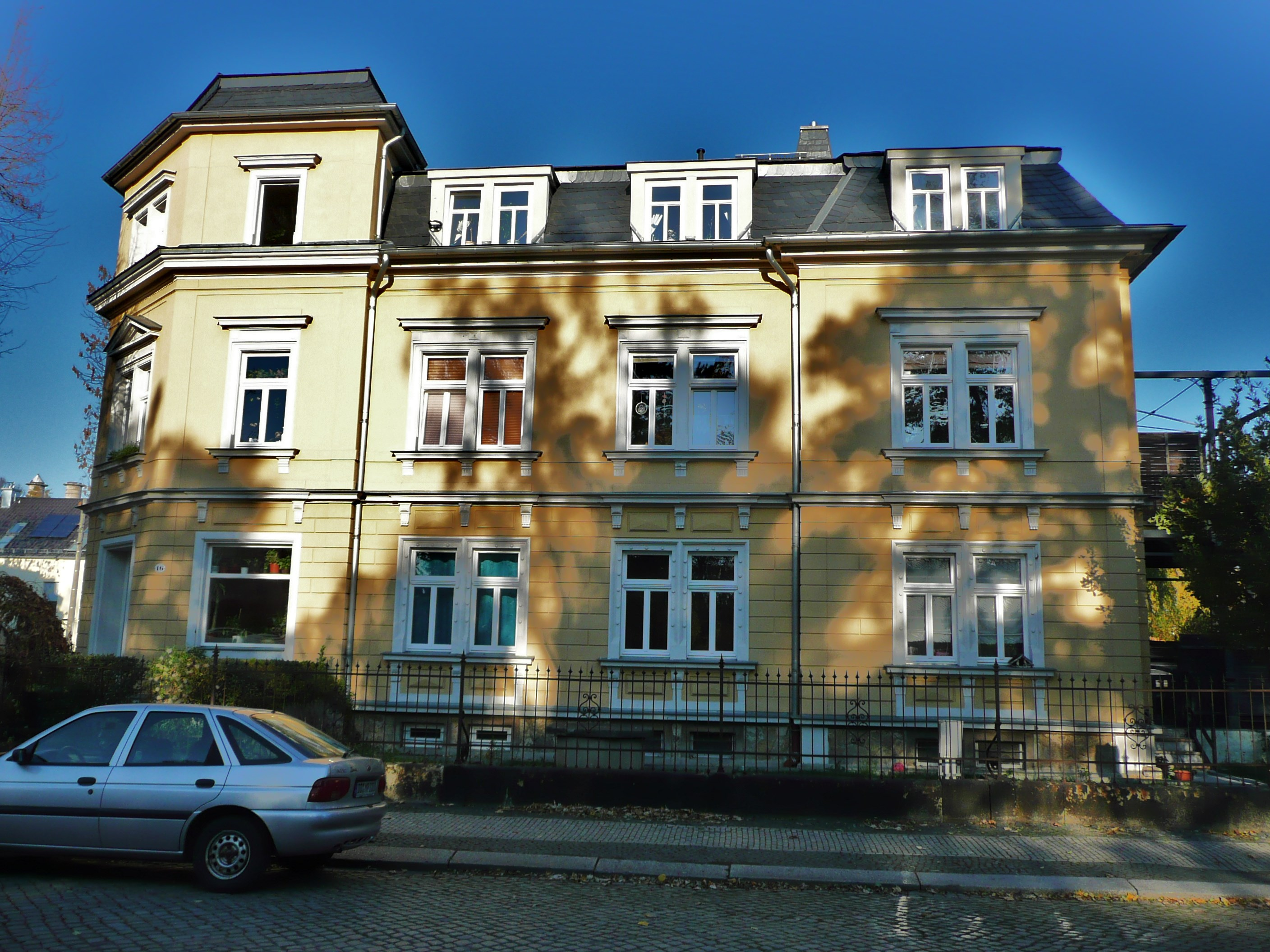 Wohnhaus Niedersedlitz Sosaer Straße16